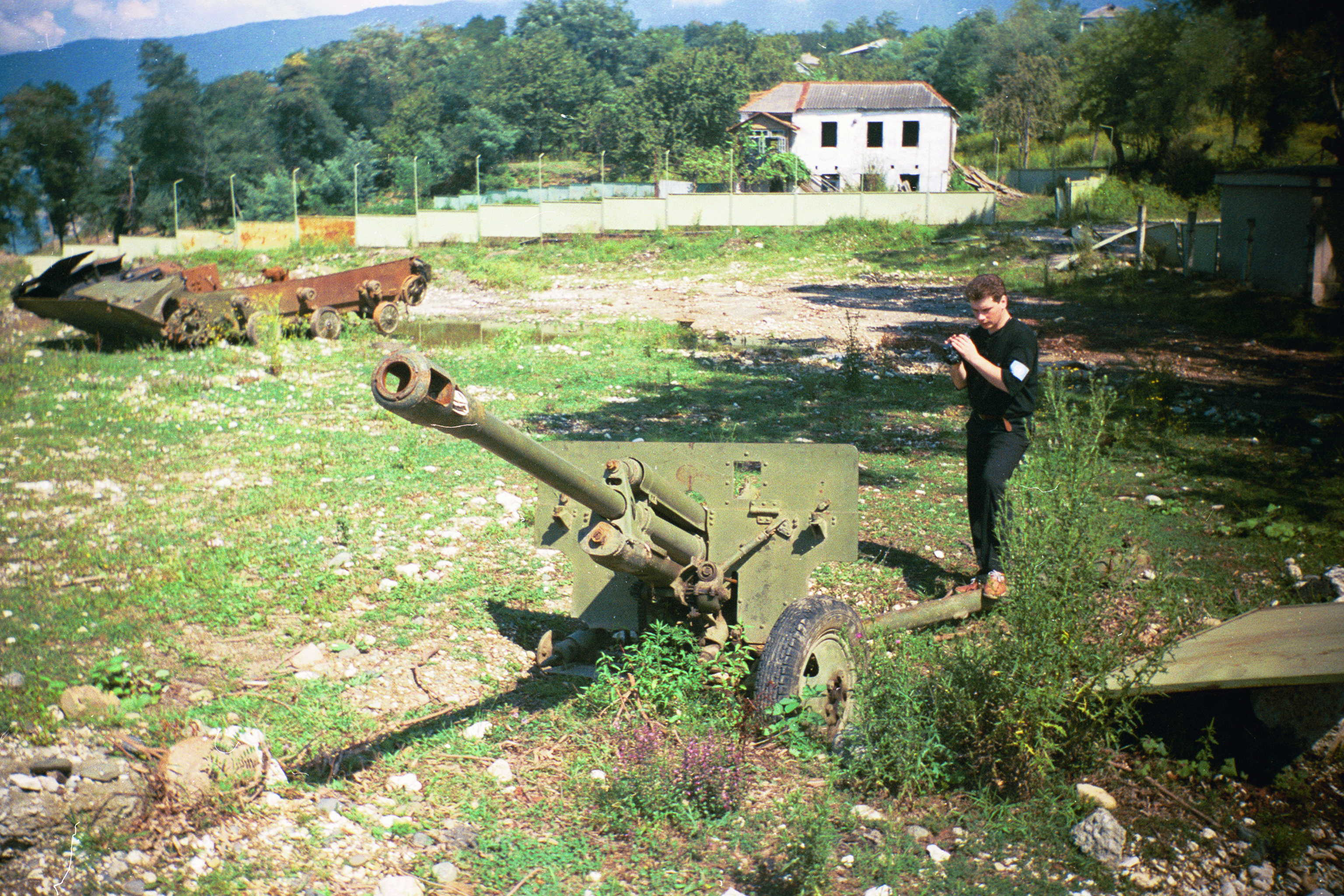 Алексей Лушников